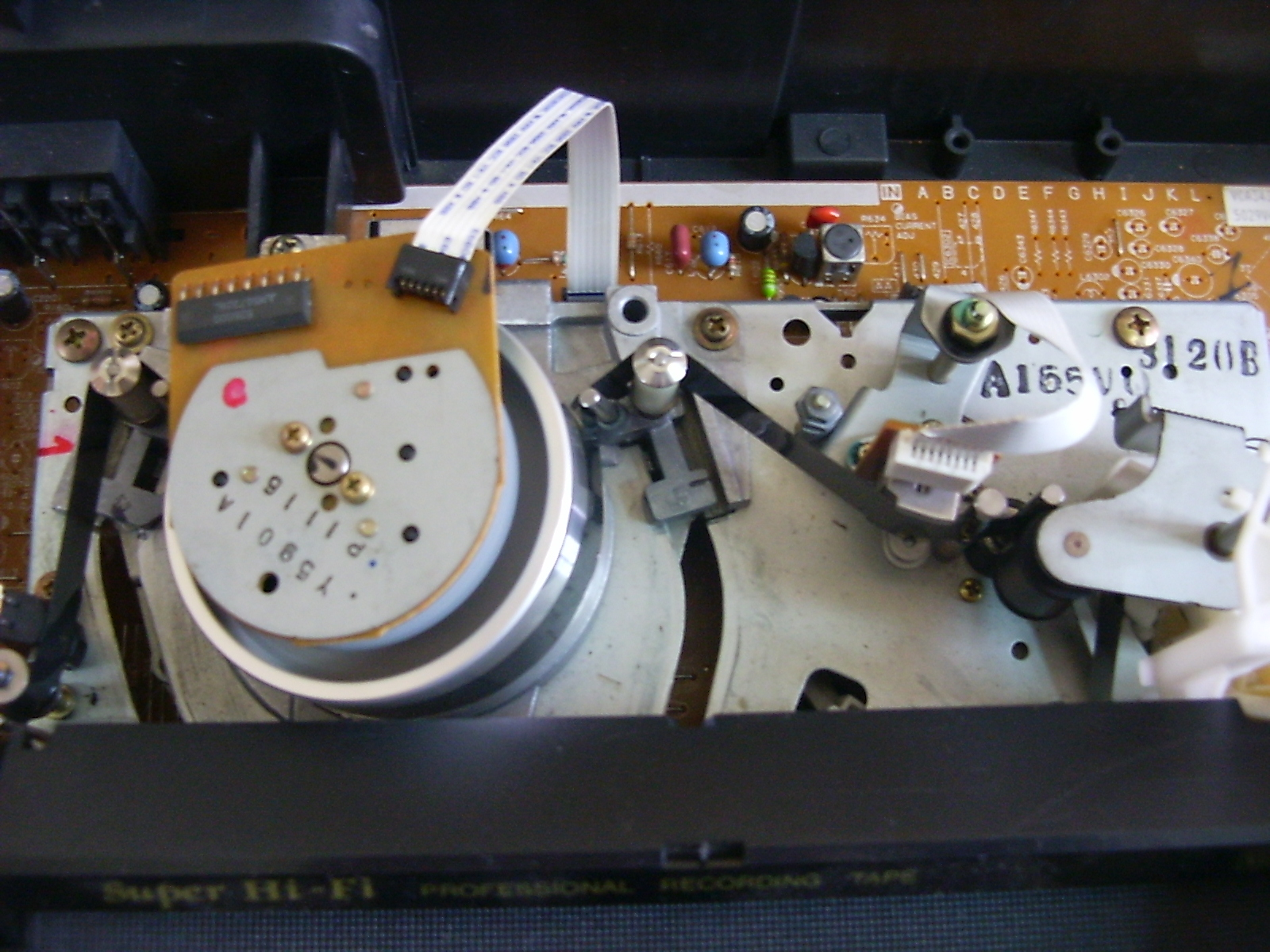 VHS录像机内部的磁带绕行方式-一般称为M型进带方式